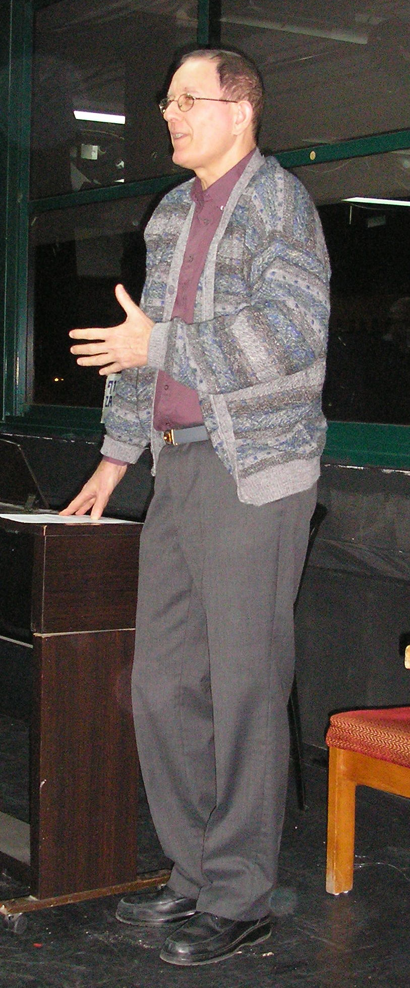 En renkontigxo de ELI en Tel Avivo